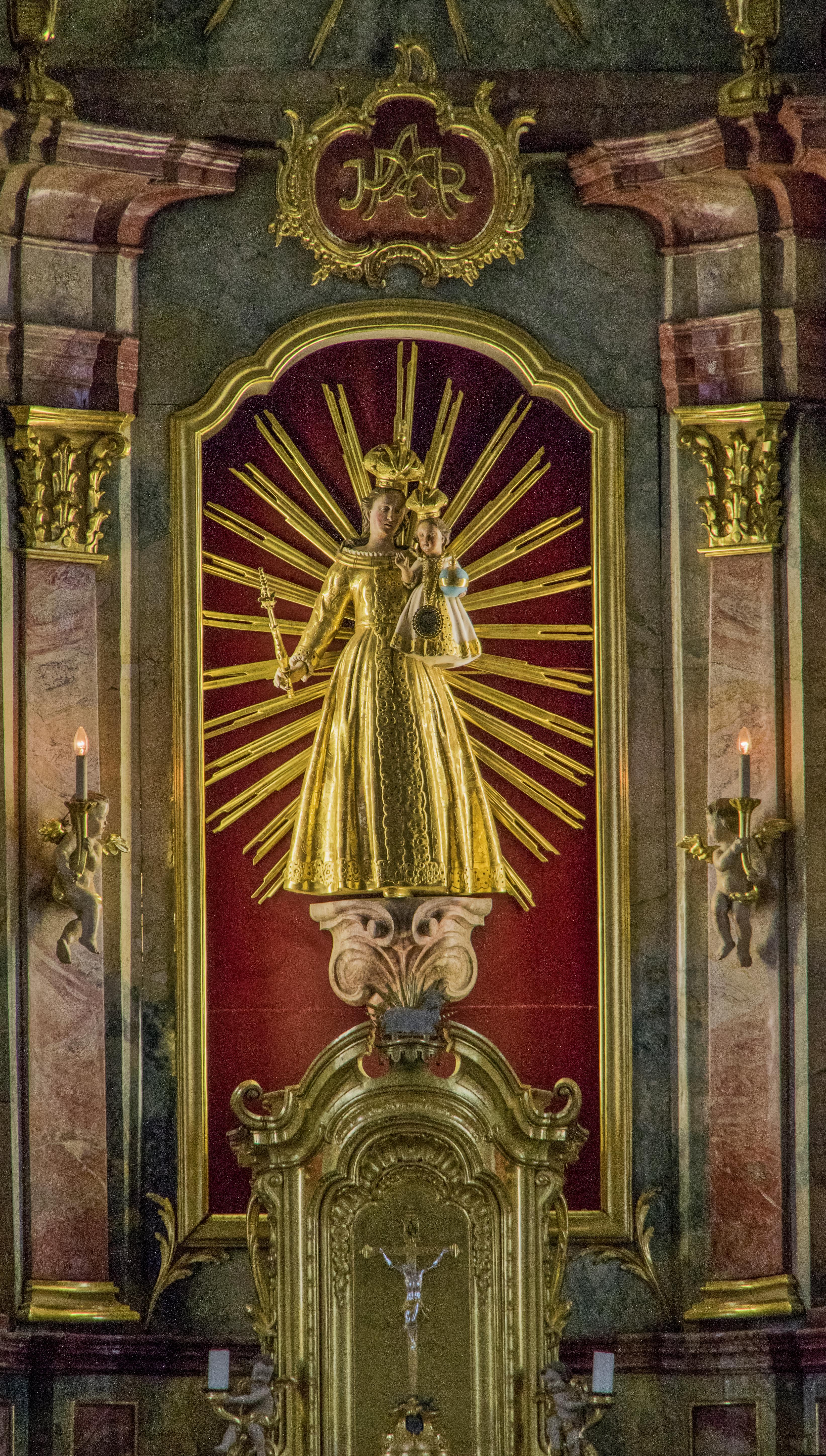 Bilder von der Wallfahrt Maria Lindenberg Gnadenbild des Hauptaltars